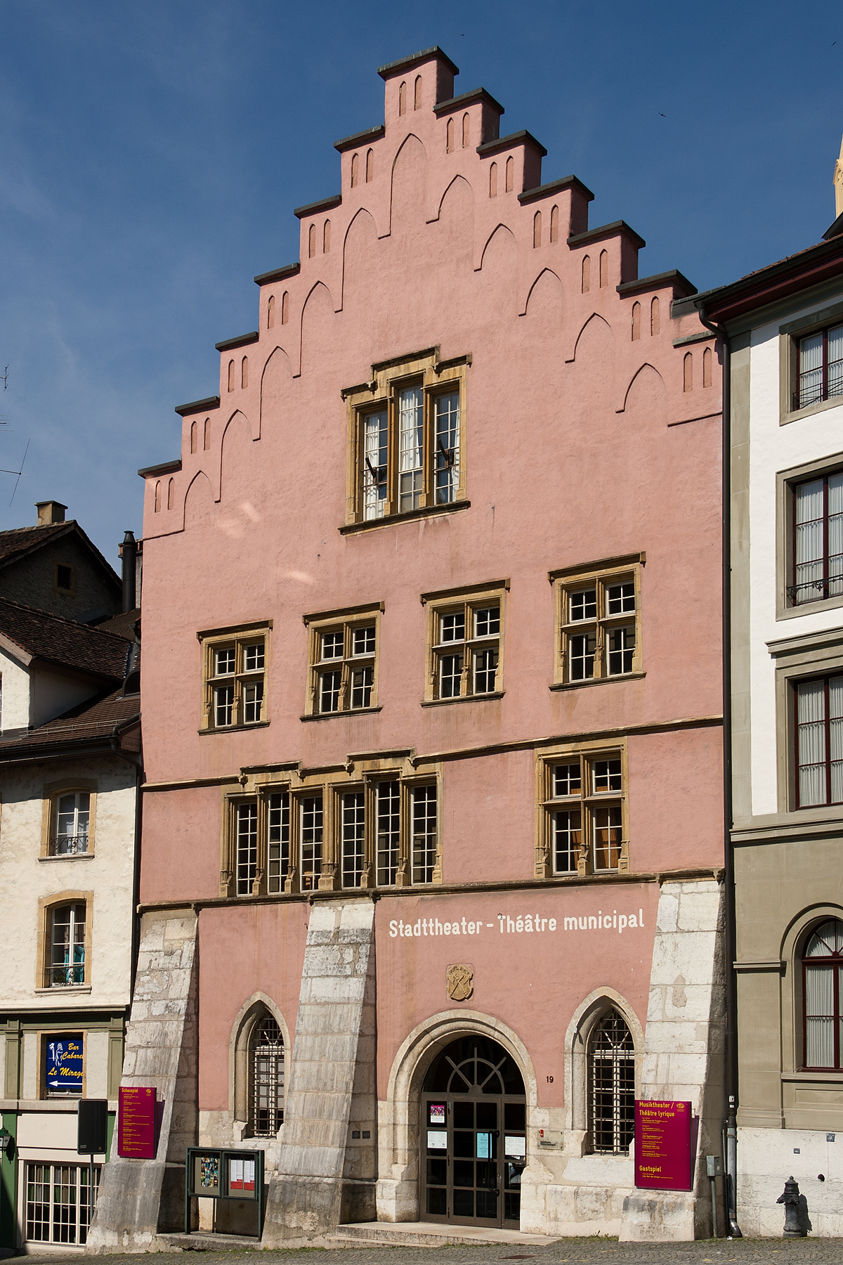 Das Stadttheater von Biel (BE), eines der Burghäuser